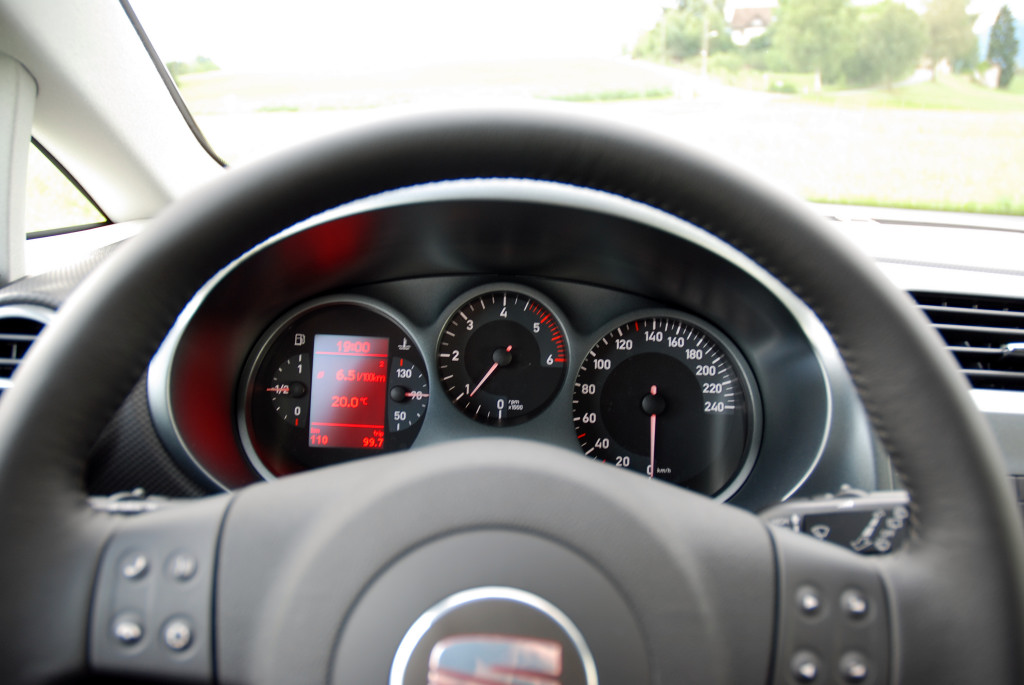 Blick auf die Bordinstrumente